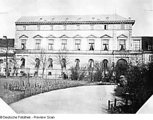 Palais Oppenheim (Palais-Kaskel-Oppenheim)